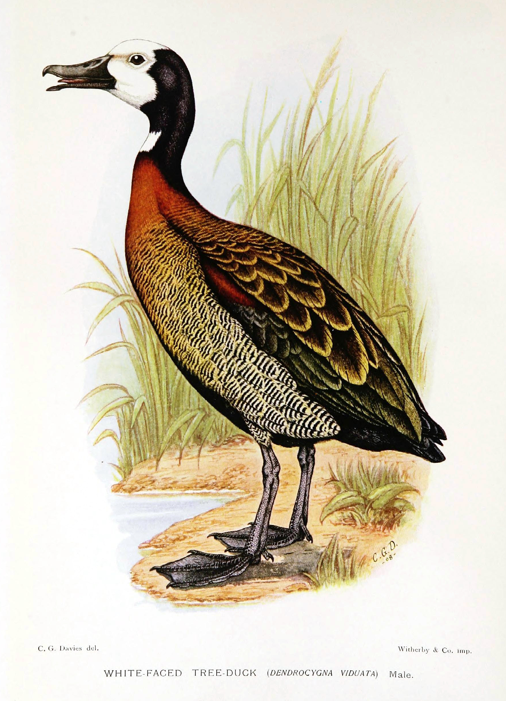 Dendrocygna viduata